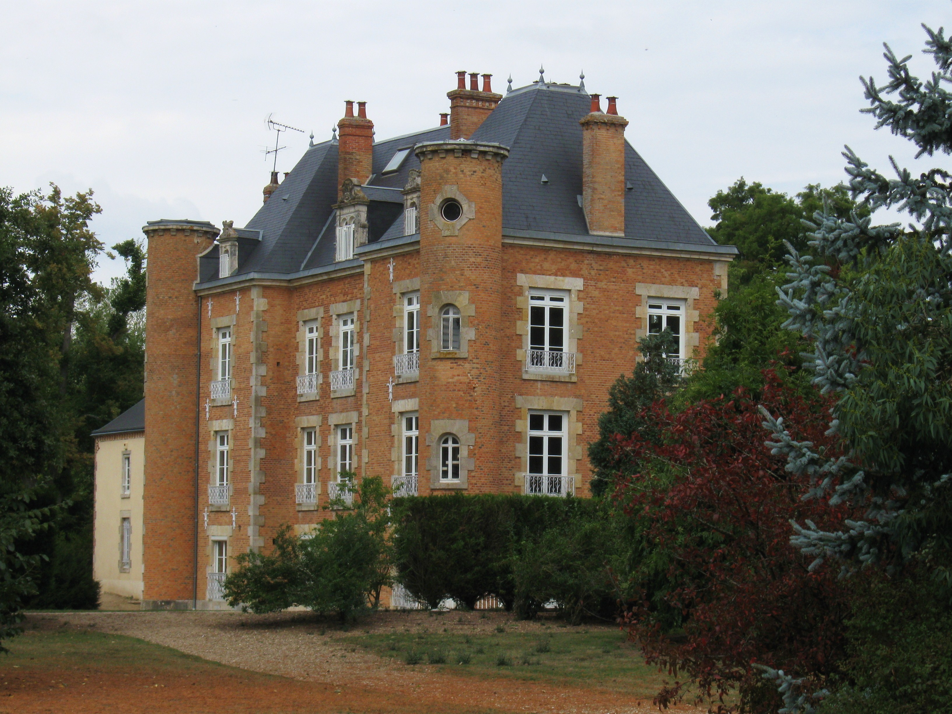 Château de la Motte, Saint-Cyr-en-Val, Loiret, France